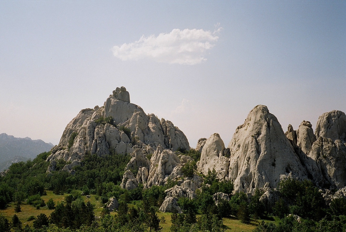 Velebit/Velebitas